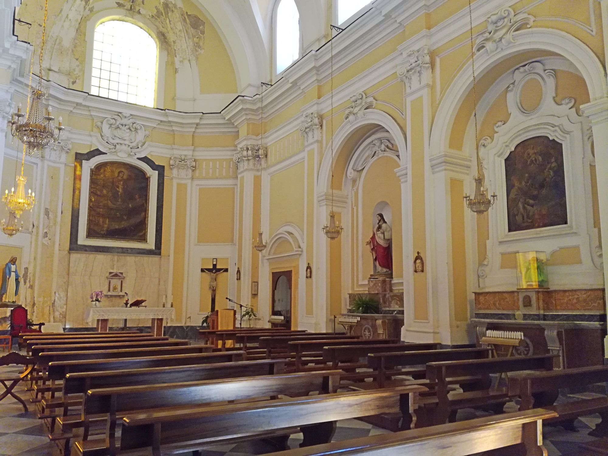 Santa Maria Ognibene